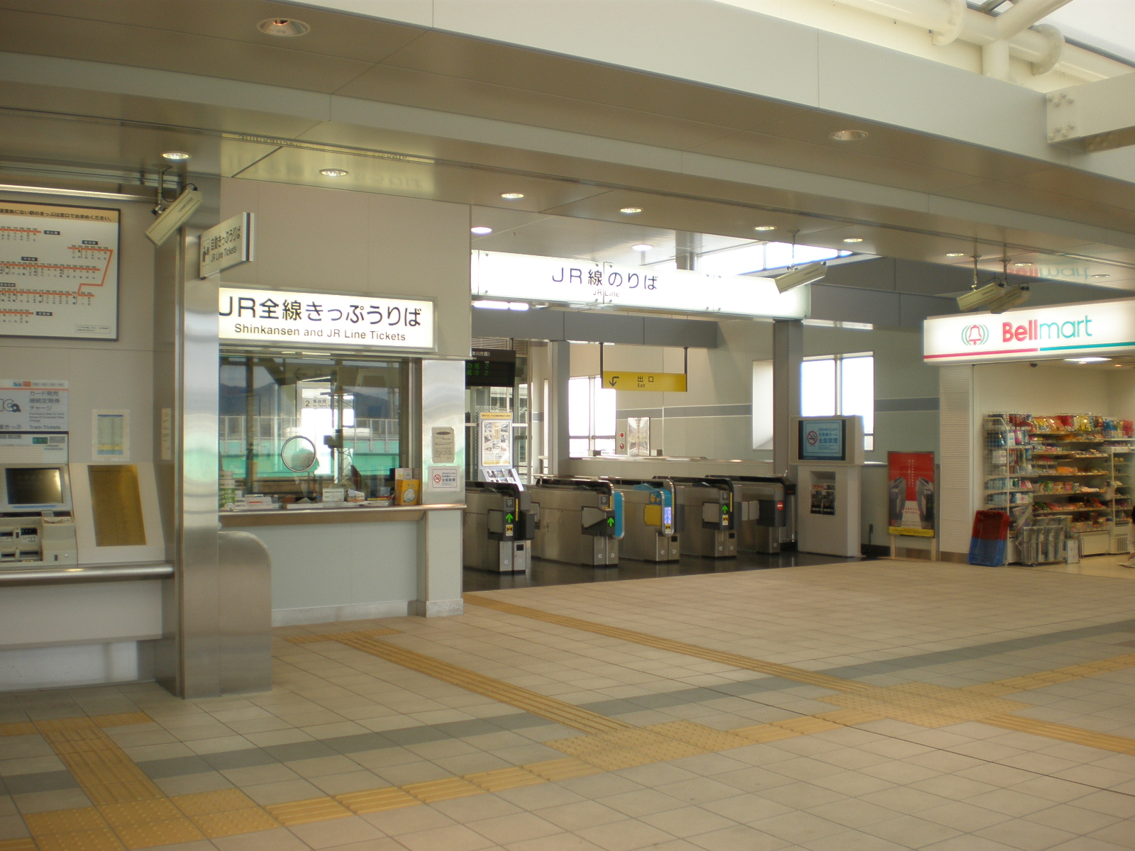 愛知県春日井市にある神領駅の改札口